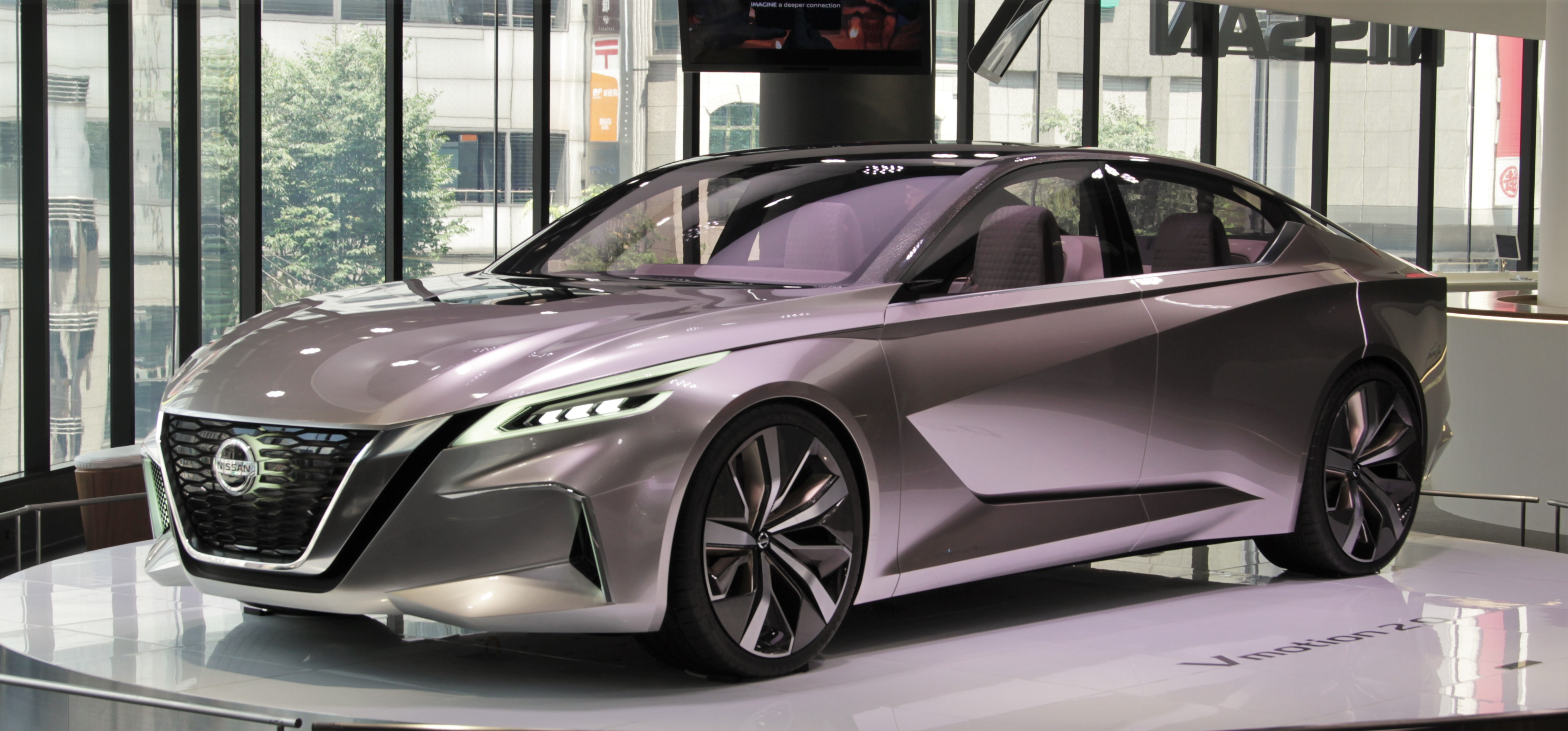 Nissan Vmotion 2.0